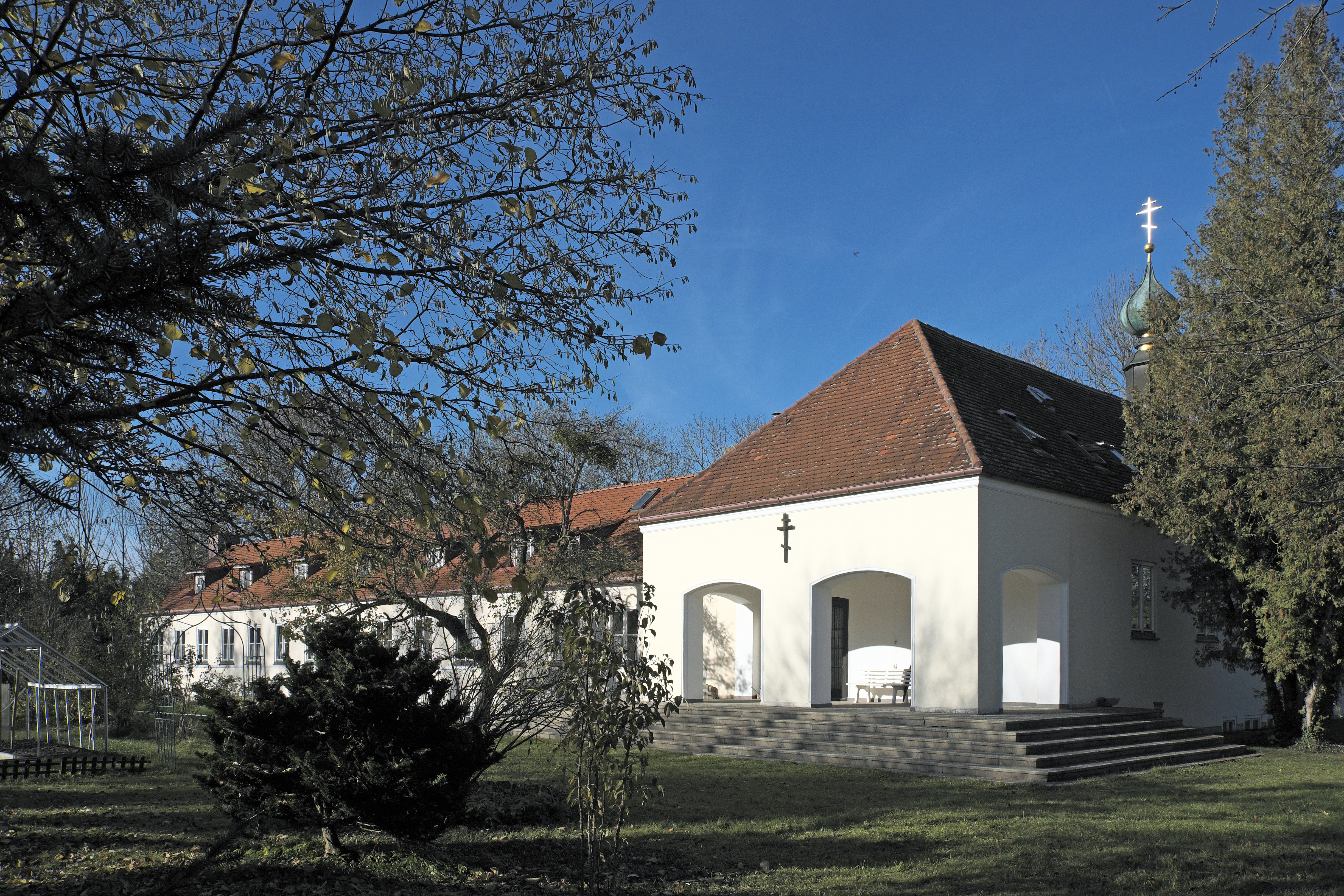 Kloster des Heiligen Hiob von Potschajew in Obermenzing im Stadtbezirk Pasing-Obermenzing in München (Bayern/Deutschland)